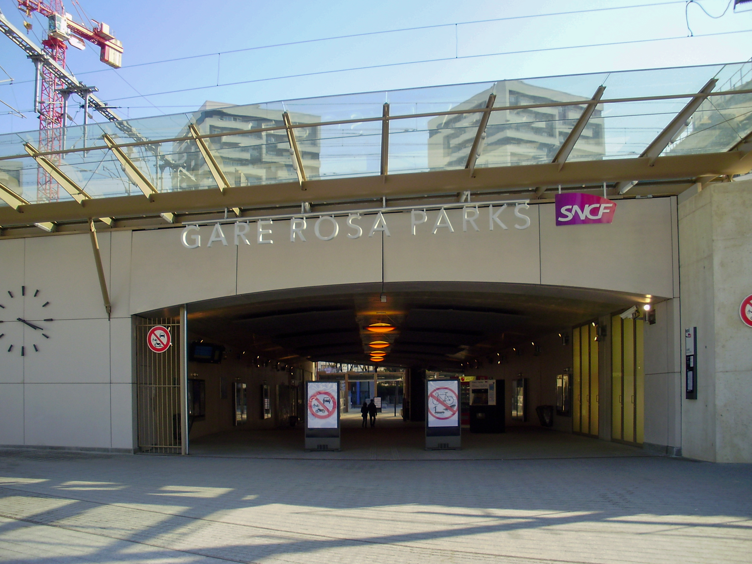 Entrée de la gare Rosa Parks, à Paris 19e, France, du côté nord, devant l'arrêt de tramway de la ligne T3b.